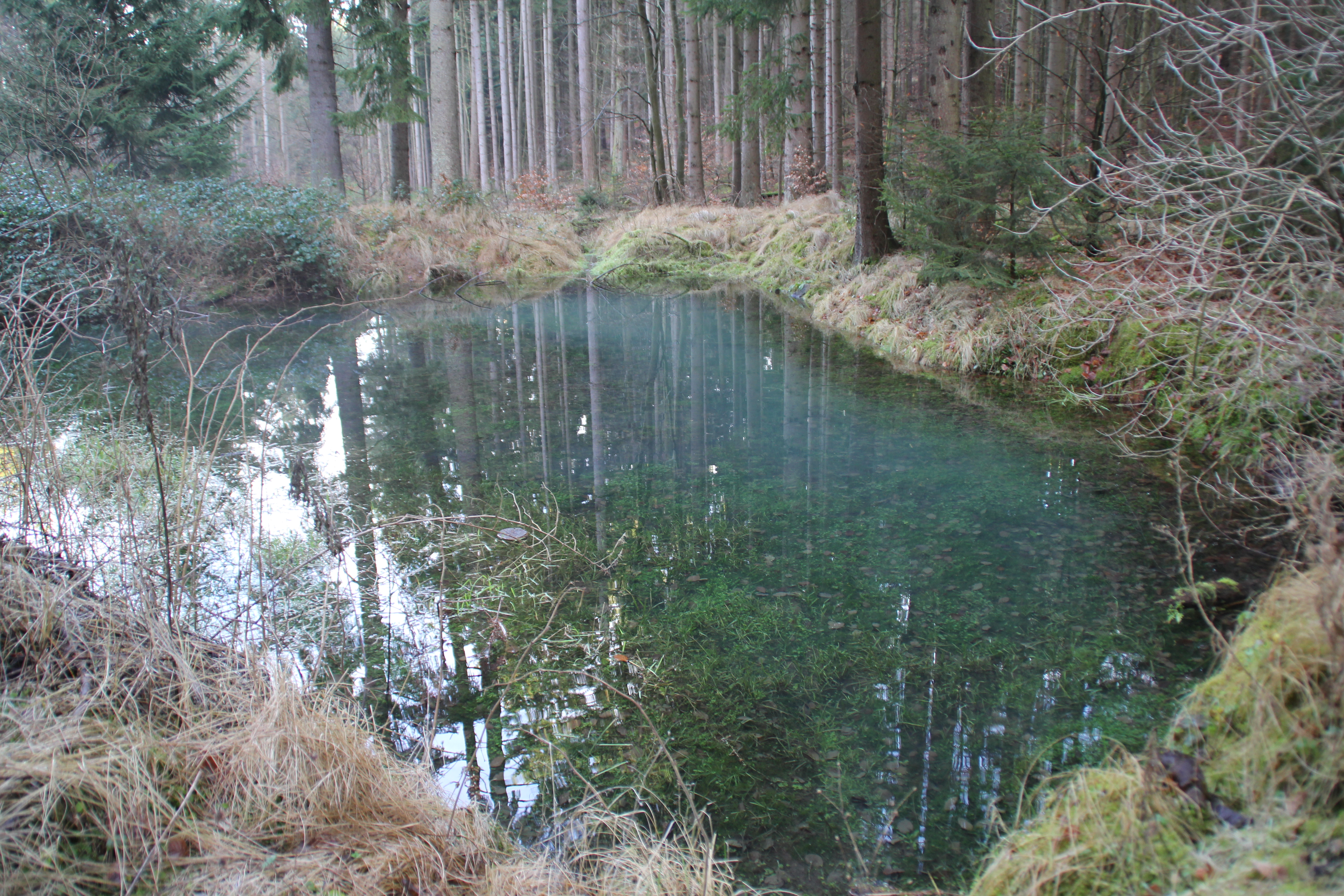 Der südlich von Rechtenbach liegende, als Naturdenkmal ausgewiesene Untere Molkenbrunnen ist die Quelle des Hemmgrabens